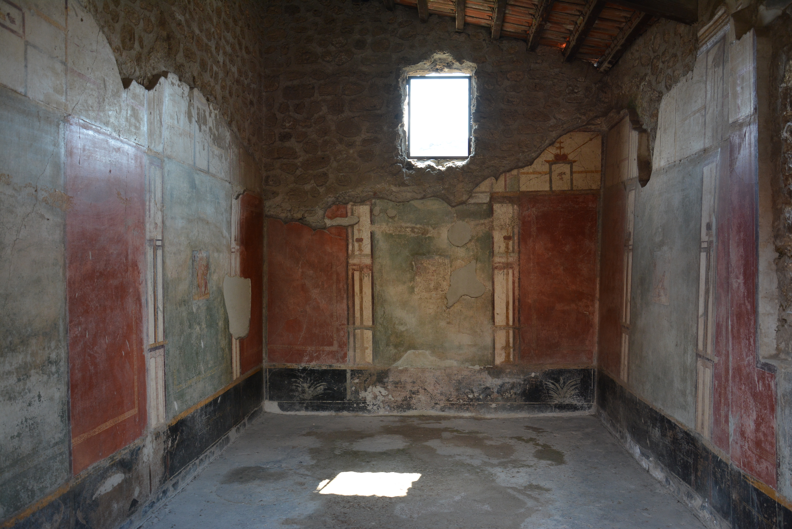 Casa di Marco Lucrezio Frontone - MIBACT This is a photo of a monument which is part of cultural heritage of Italy.